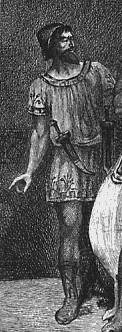 Spendio rappresentato da V.A. Poirson